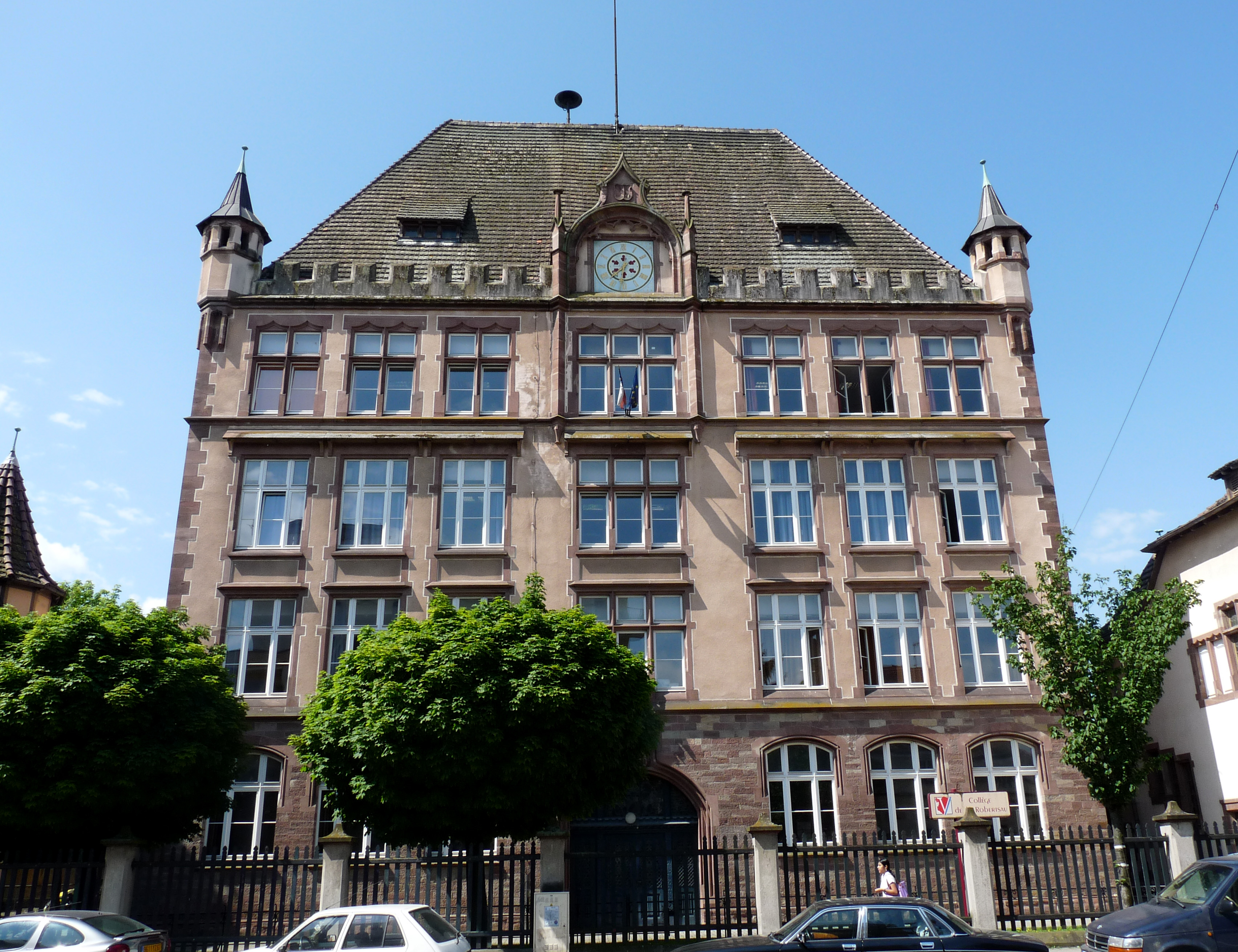 Collège de la Robertsau (Strasbourg), façade sur la rue Boecklin